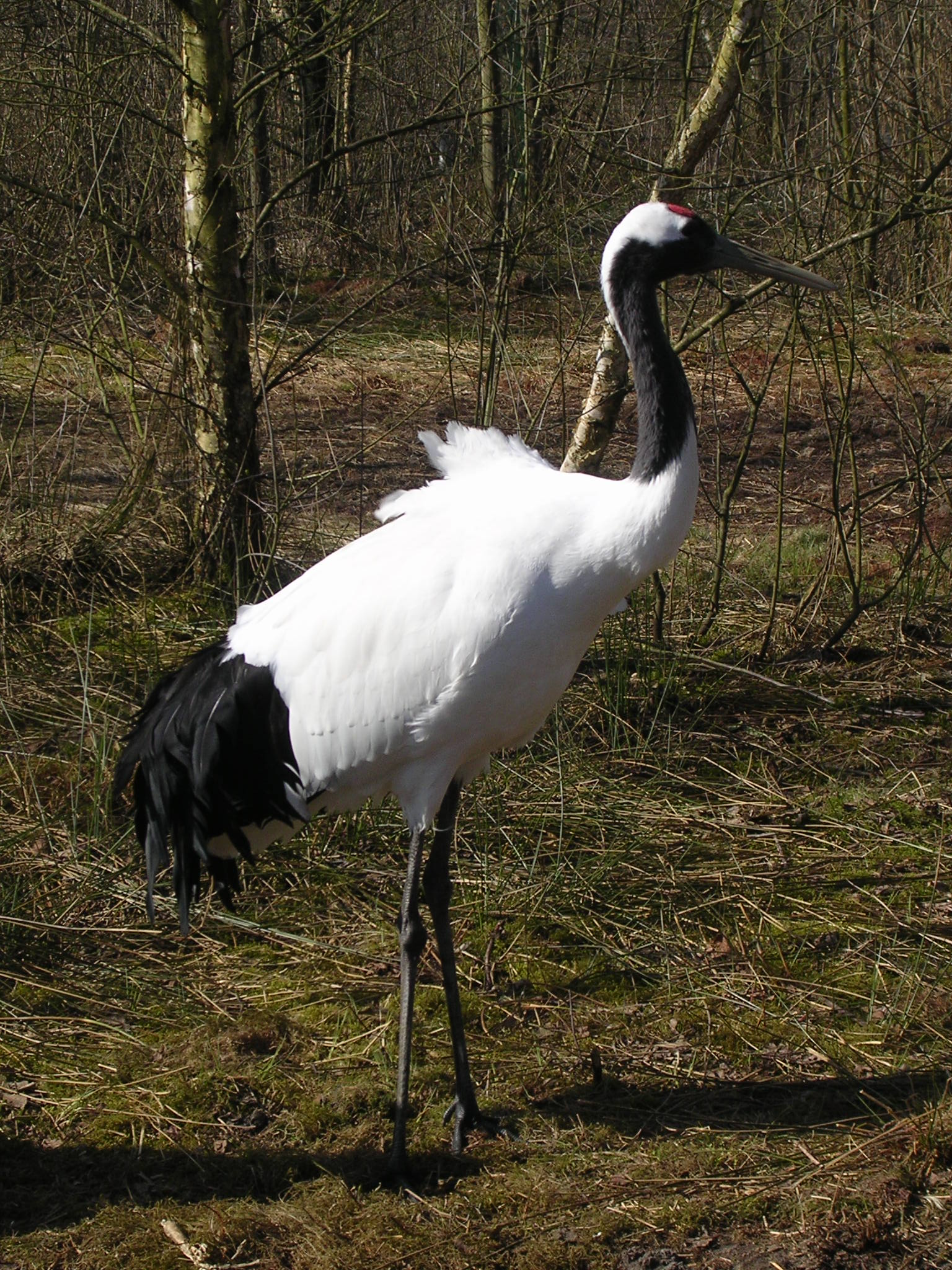 Grus japonensis in Aqua Zoo in Leeuwarden (The Netherlands)